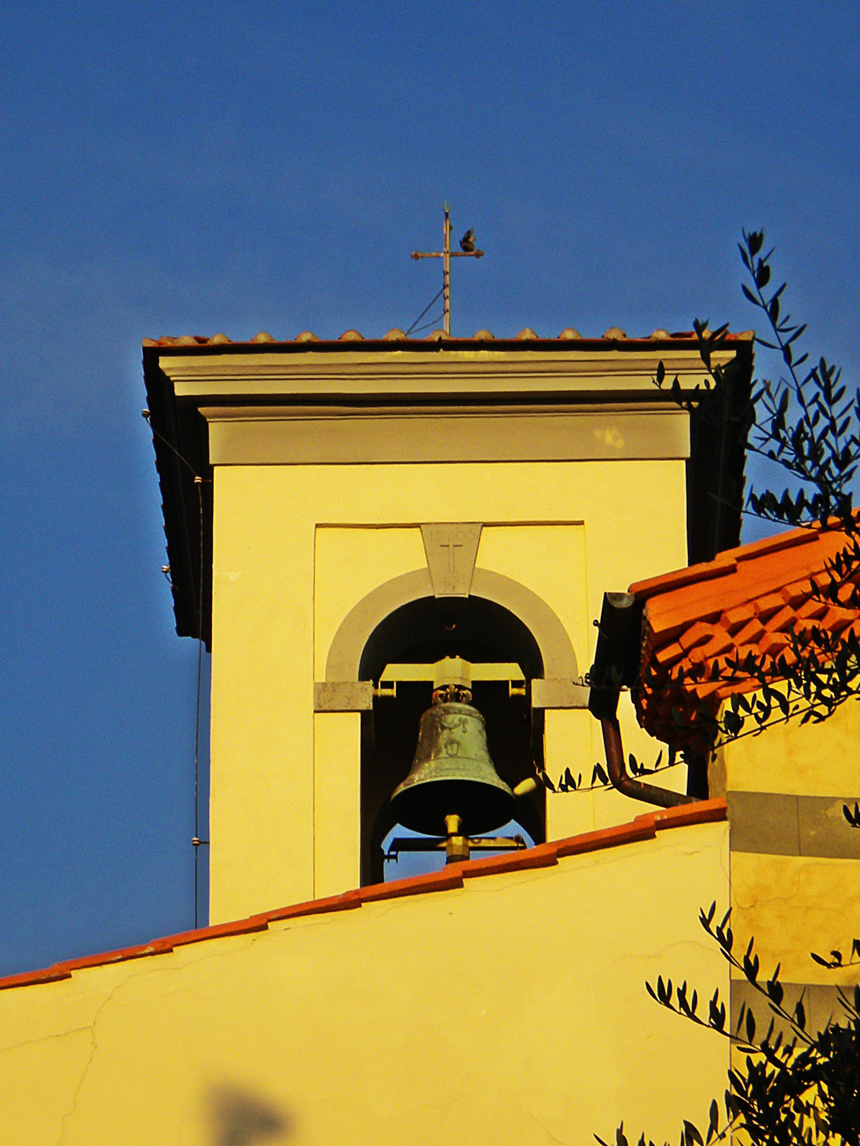 Santi Vito e Modesto